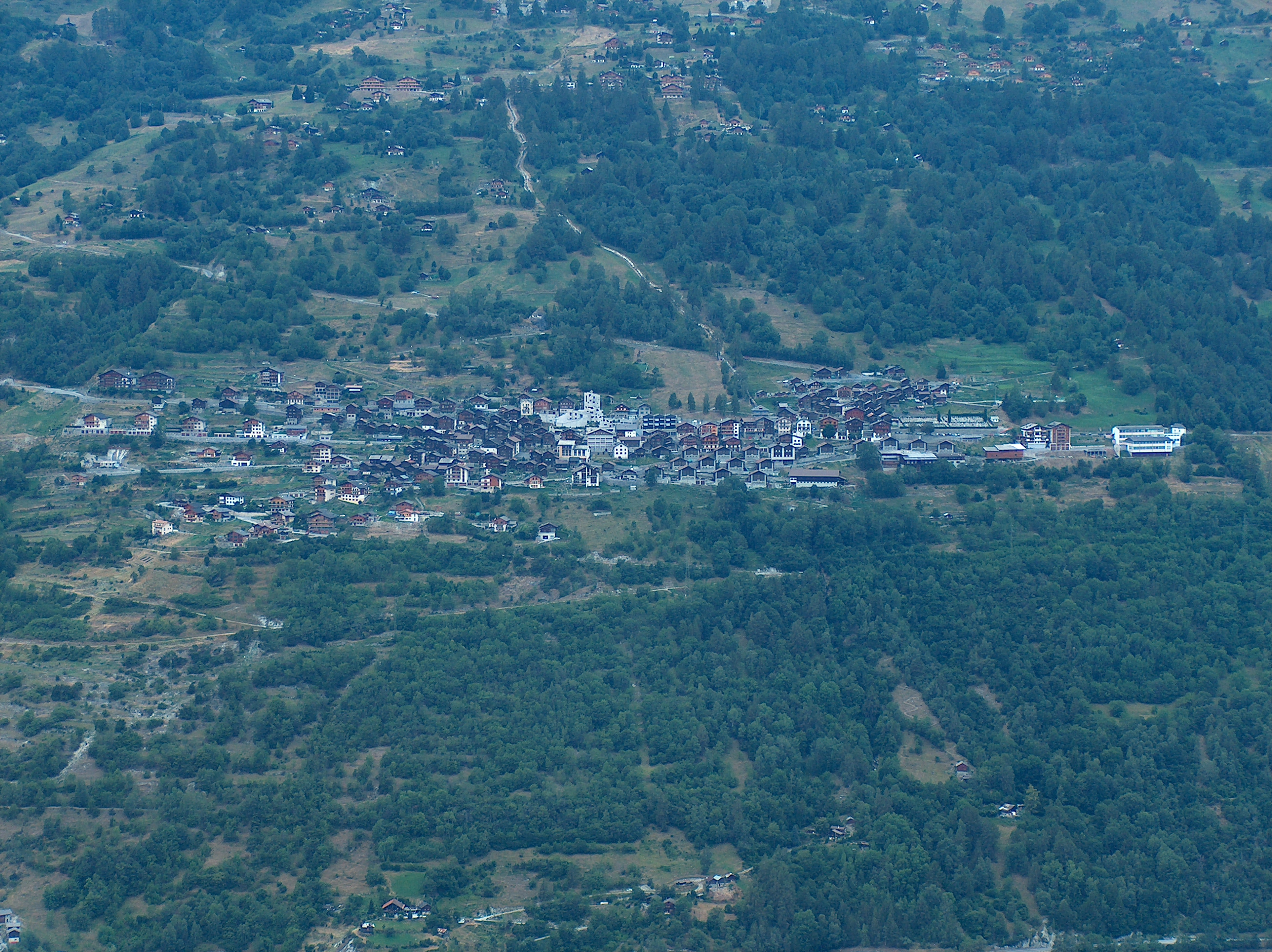 Panorama of Hérémence